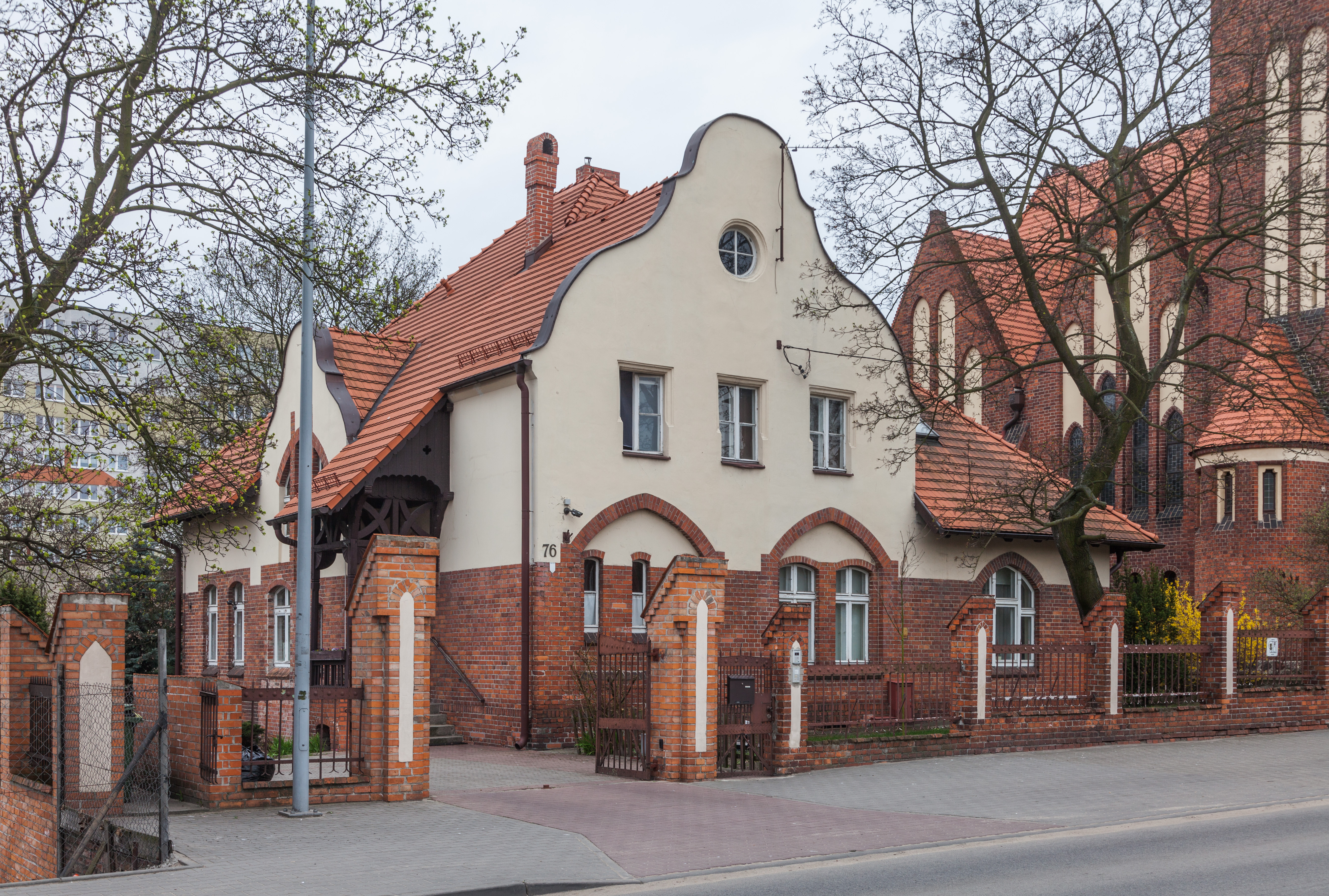 Toruń, Podgórna 76, dawna pastorówka, obecnie plebania kościoła Matki Boskiej Zwycięskiej i św. Jerzego.